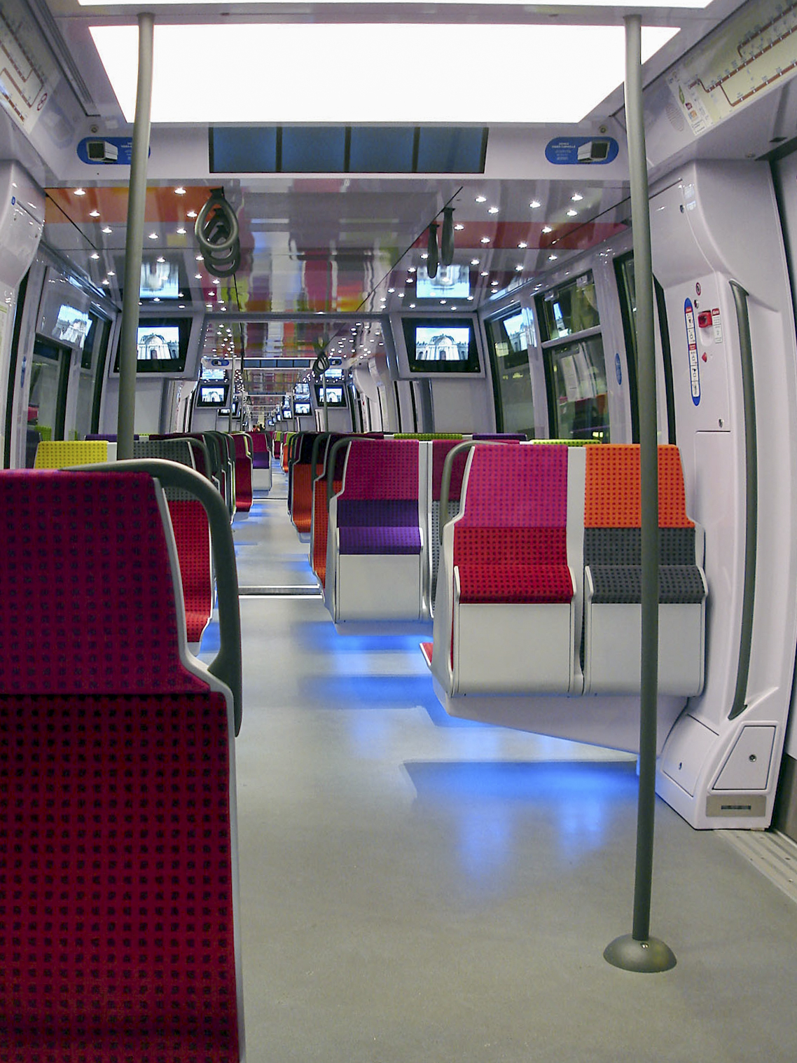 Intérieur d'une Z 50000 au technicentre Paris Nord-Joncherolles, Villetaneuse, Seine-Saint-Denis, France.